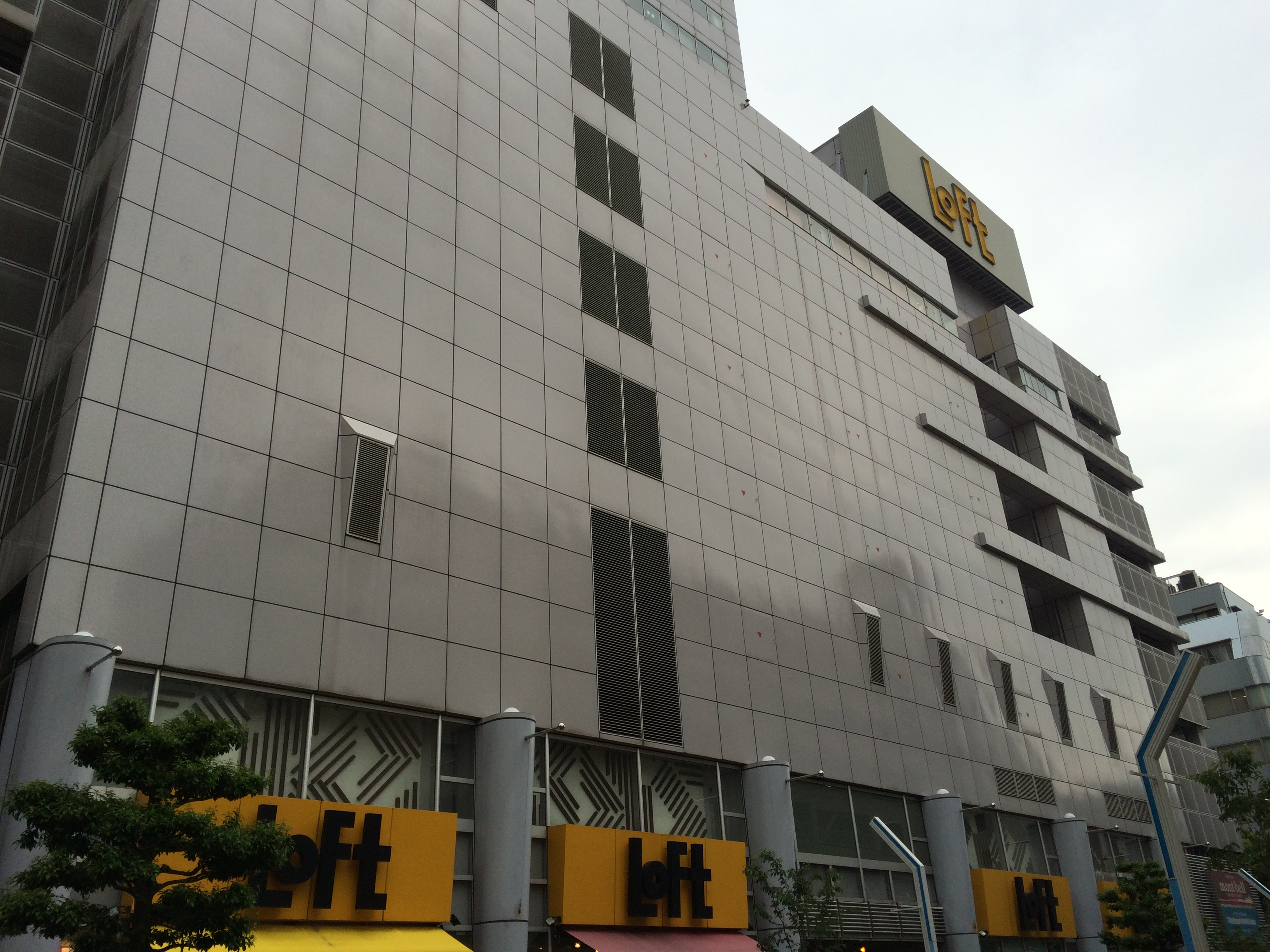 ロフト名古屋（2015年5月撮影）